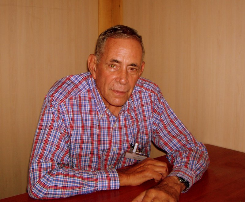 Sergio Corrieri in Istanbul, 2006